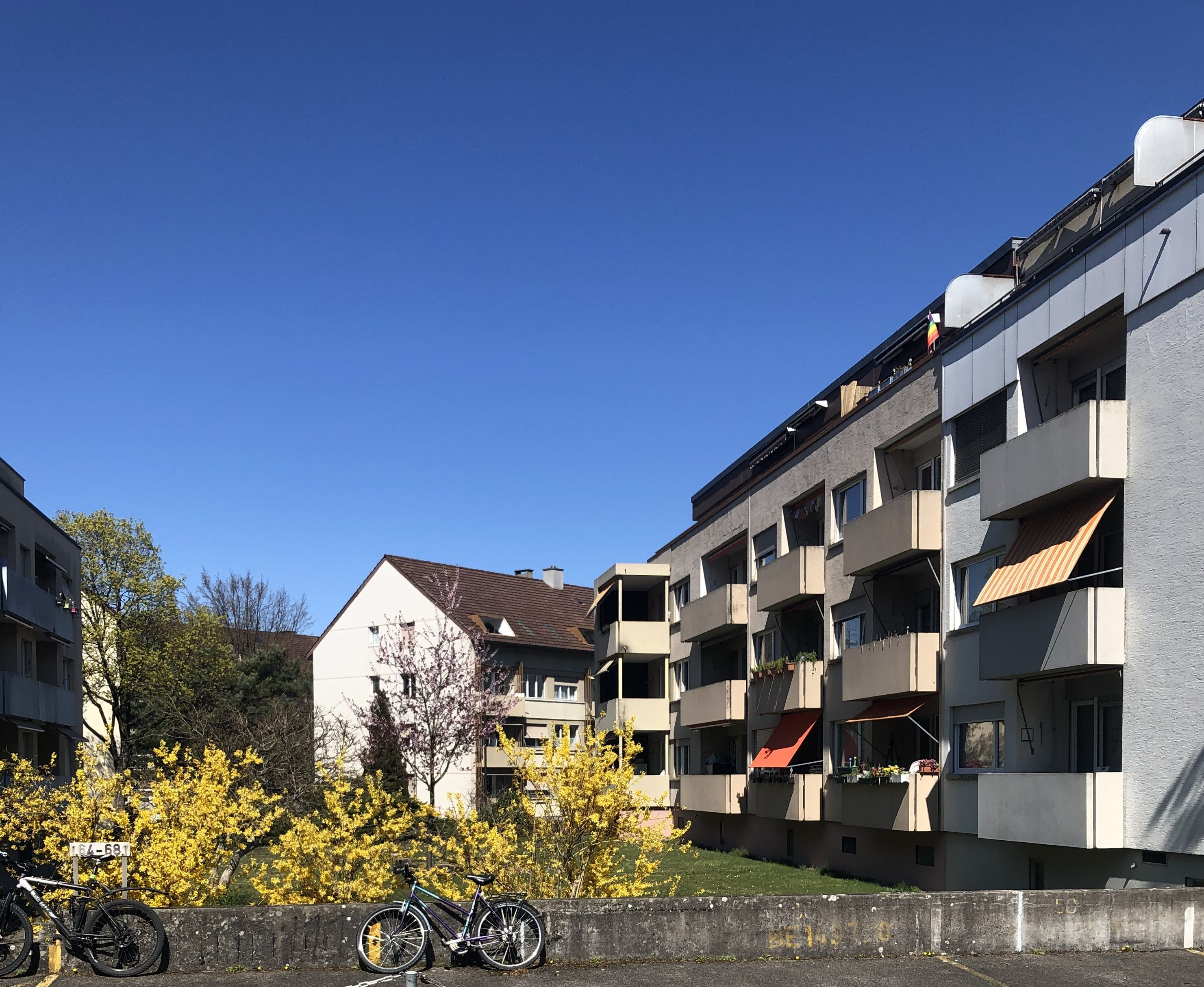 Untermatt Bebauung